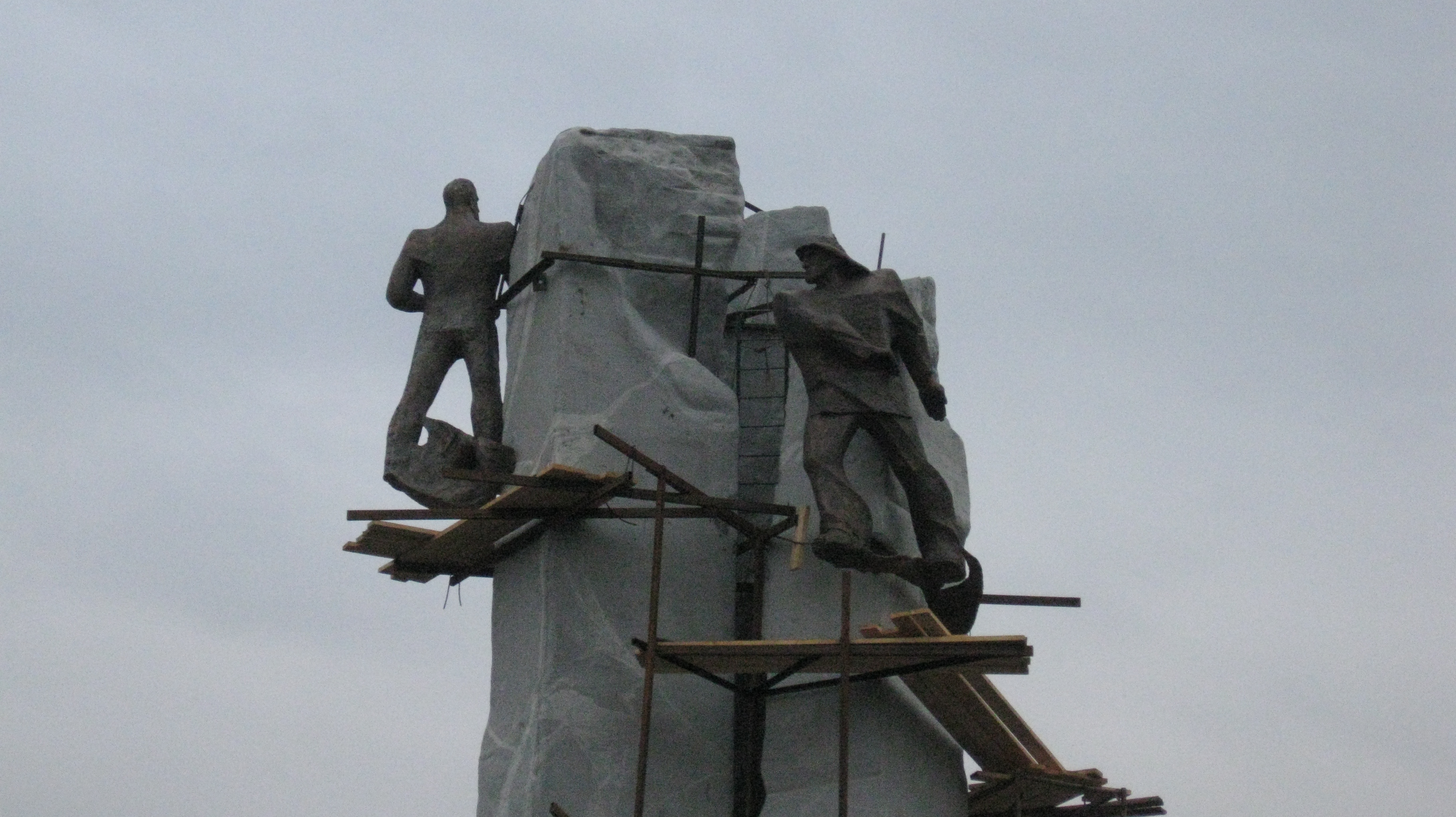 Памятник тагильским металлургам